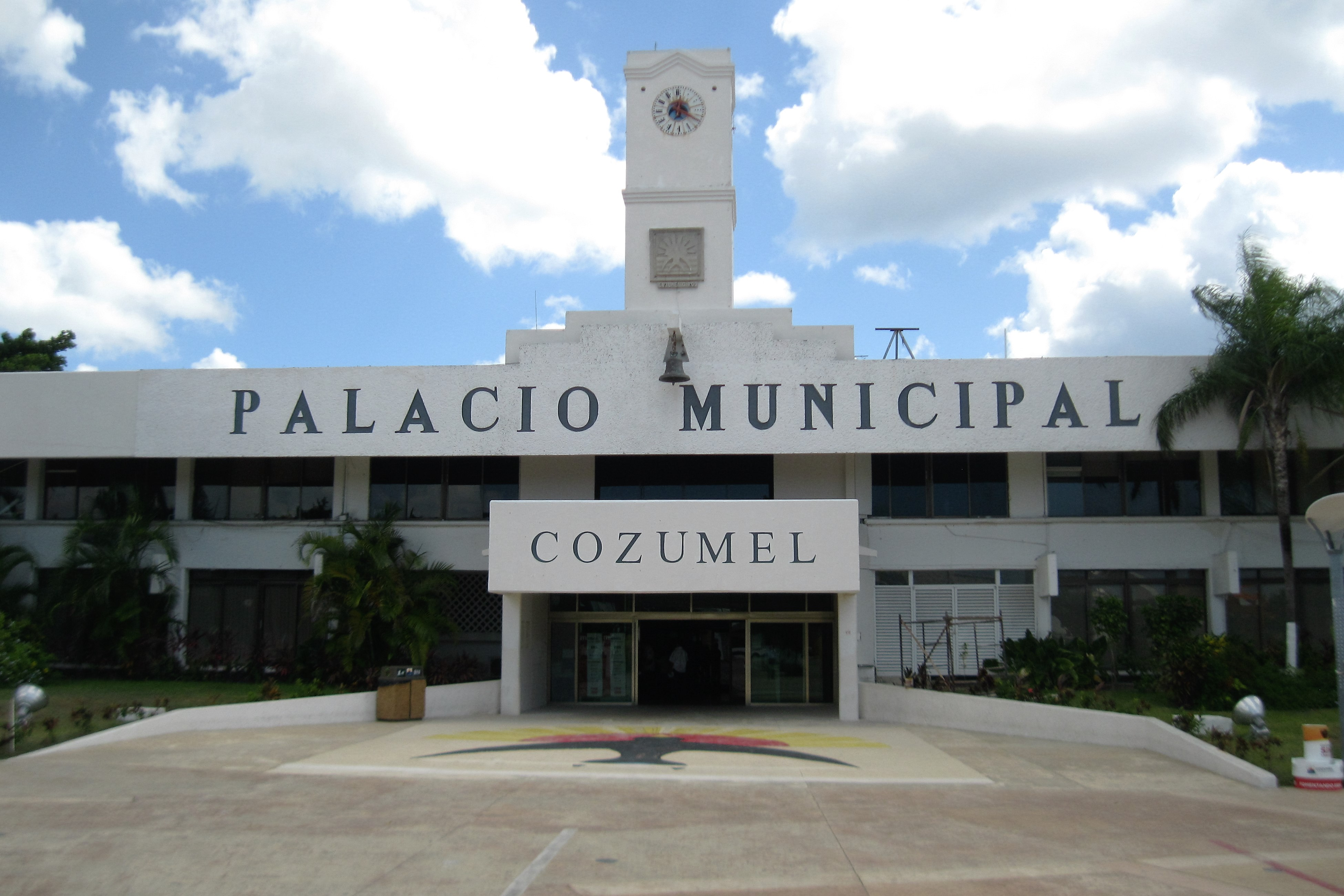 Municipal government headquarters, Cozumel Municipality, Mexico